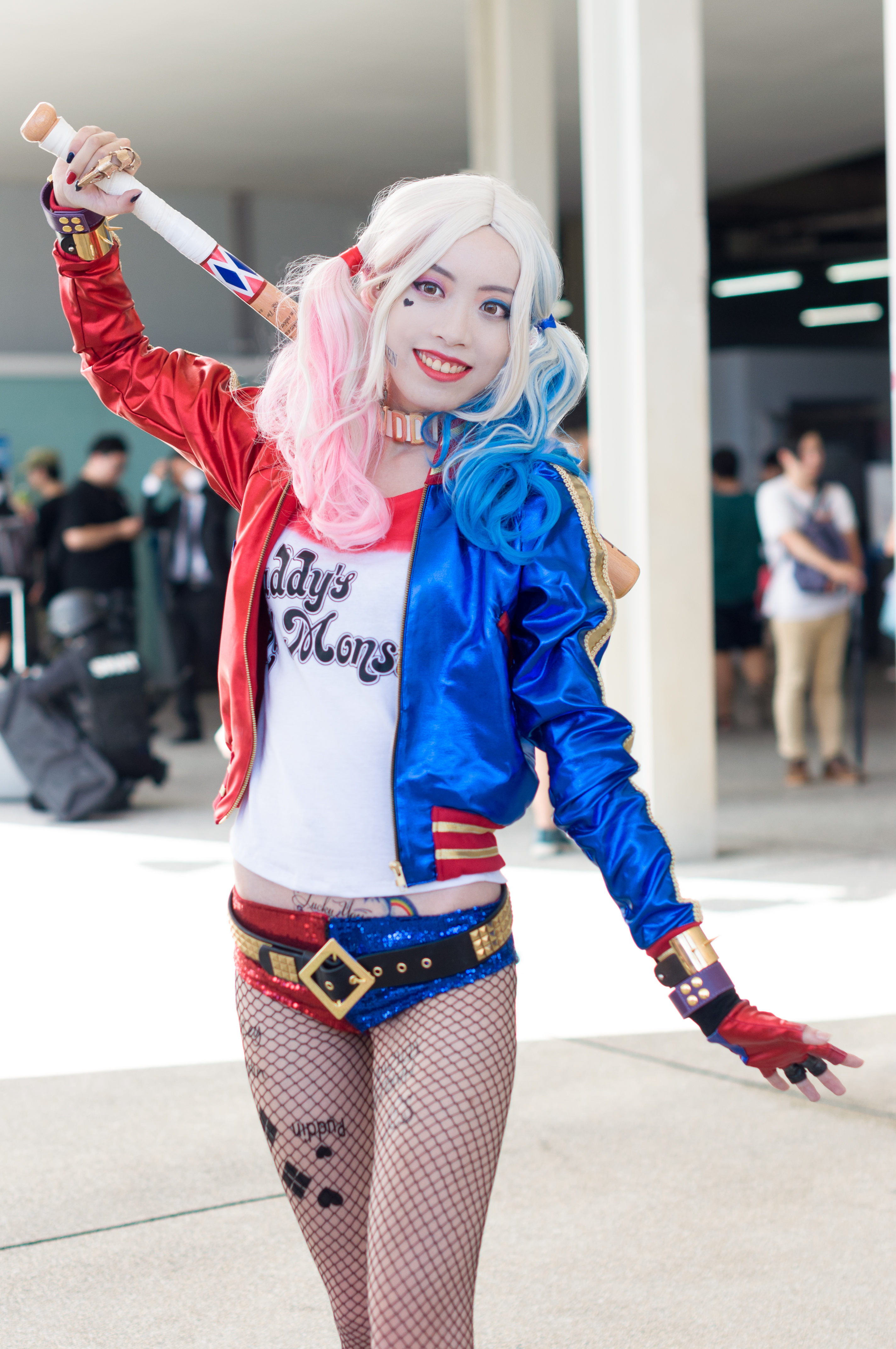 DSC_6182-編輯.jpg